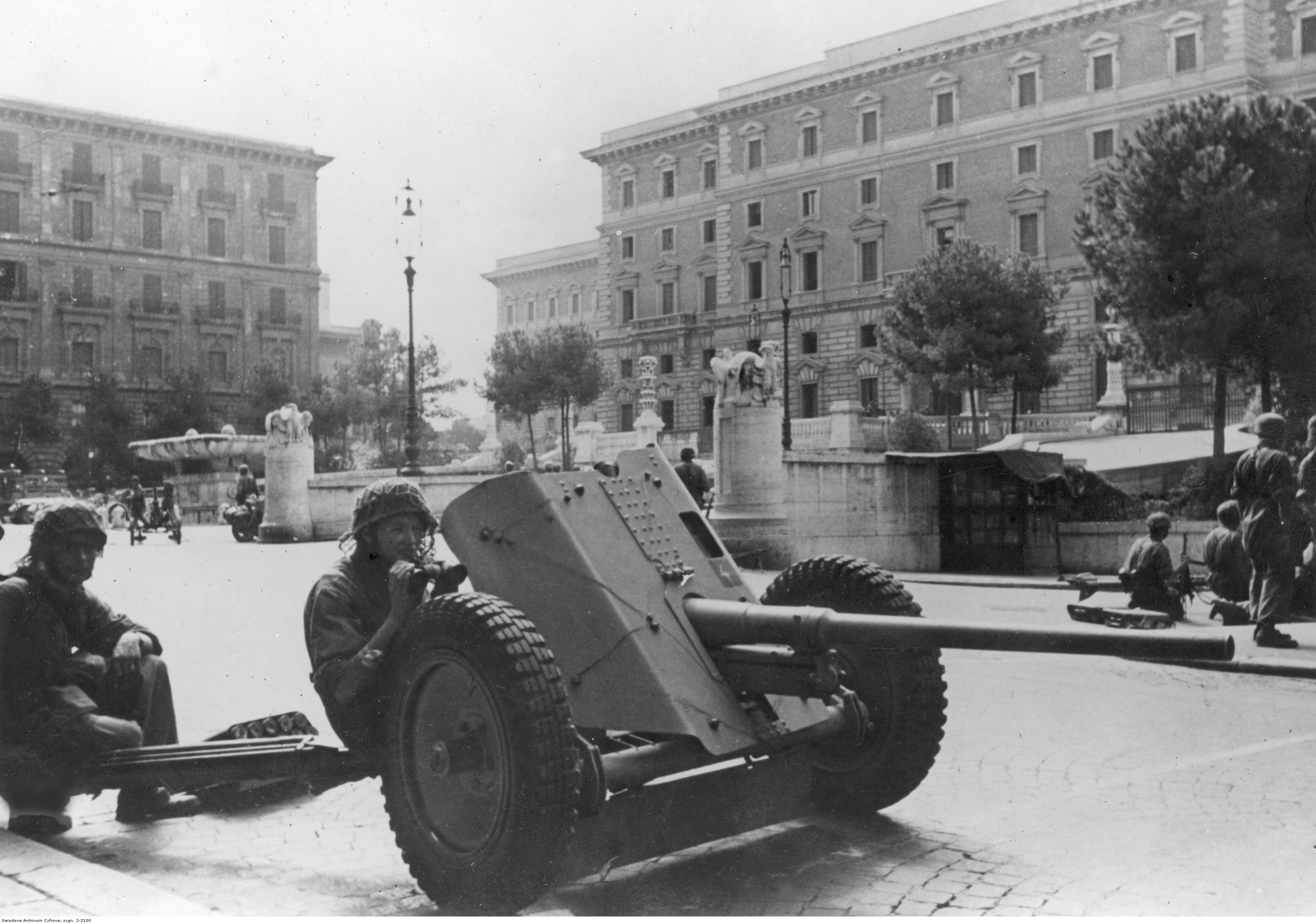 Armata przeciwpancerna Pak 41 kal 42 mm na ulicy włoskiego miasta.